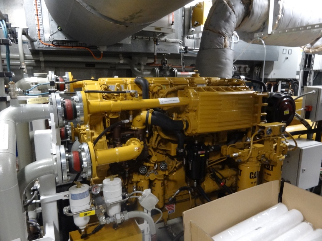 Caterpillar C18 — einer der Dieselmotoren des Kabinenfahrgastschiffs Viking Odin.